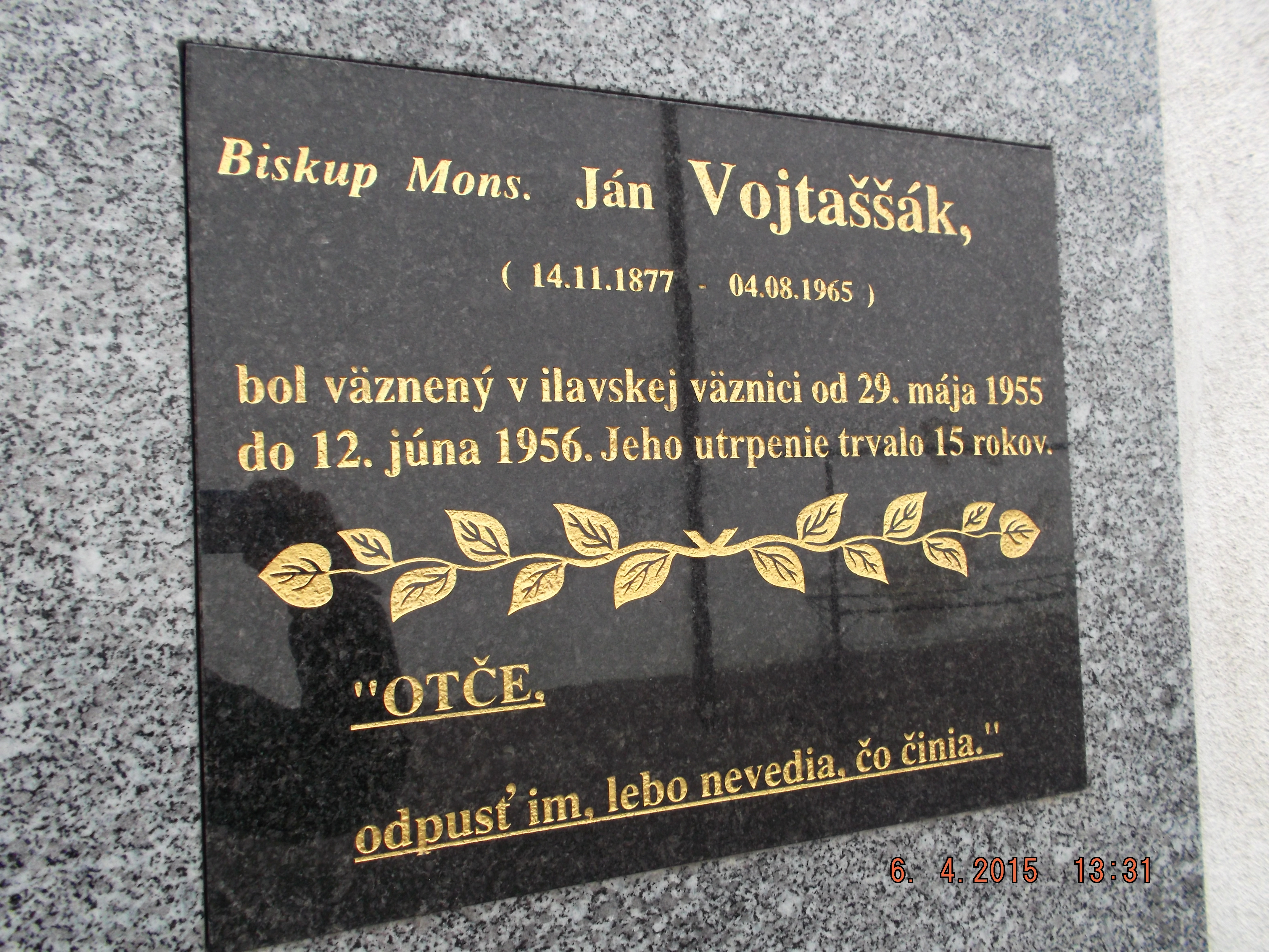 Pamätná tabuľa na múre ilavskej väznice